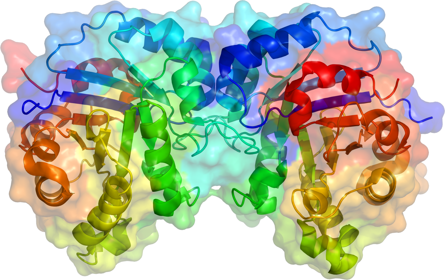 TPI1 structure